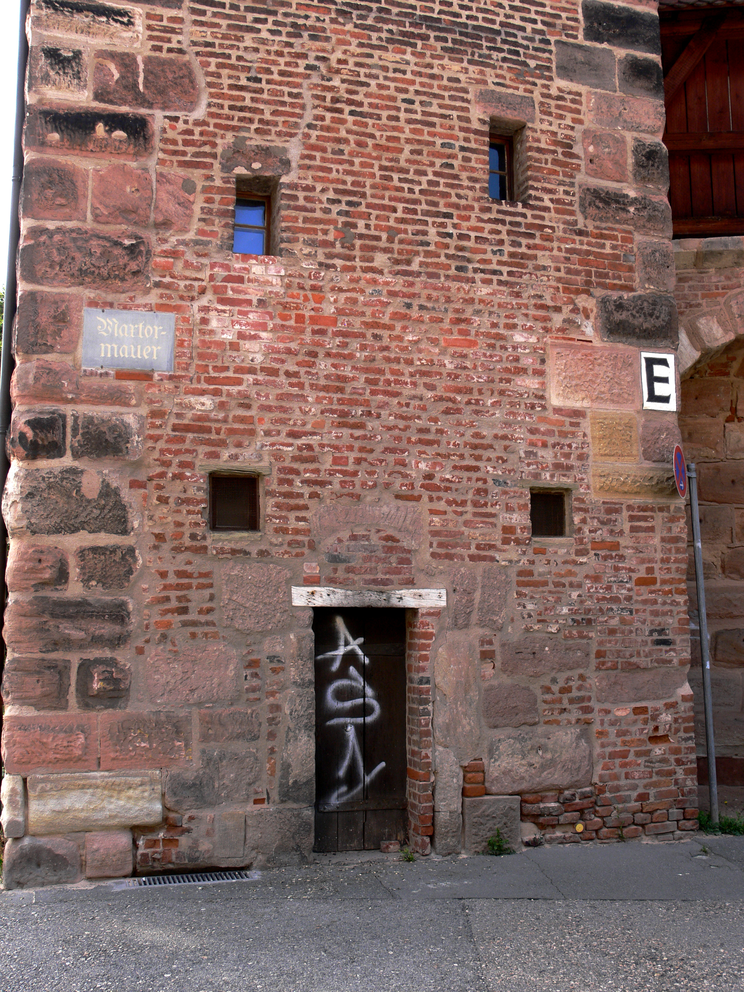 Nürnberg, Maxtormauer Turm schwarzes E (Innenseite)